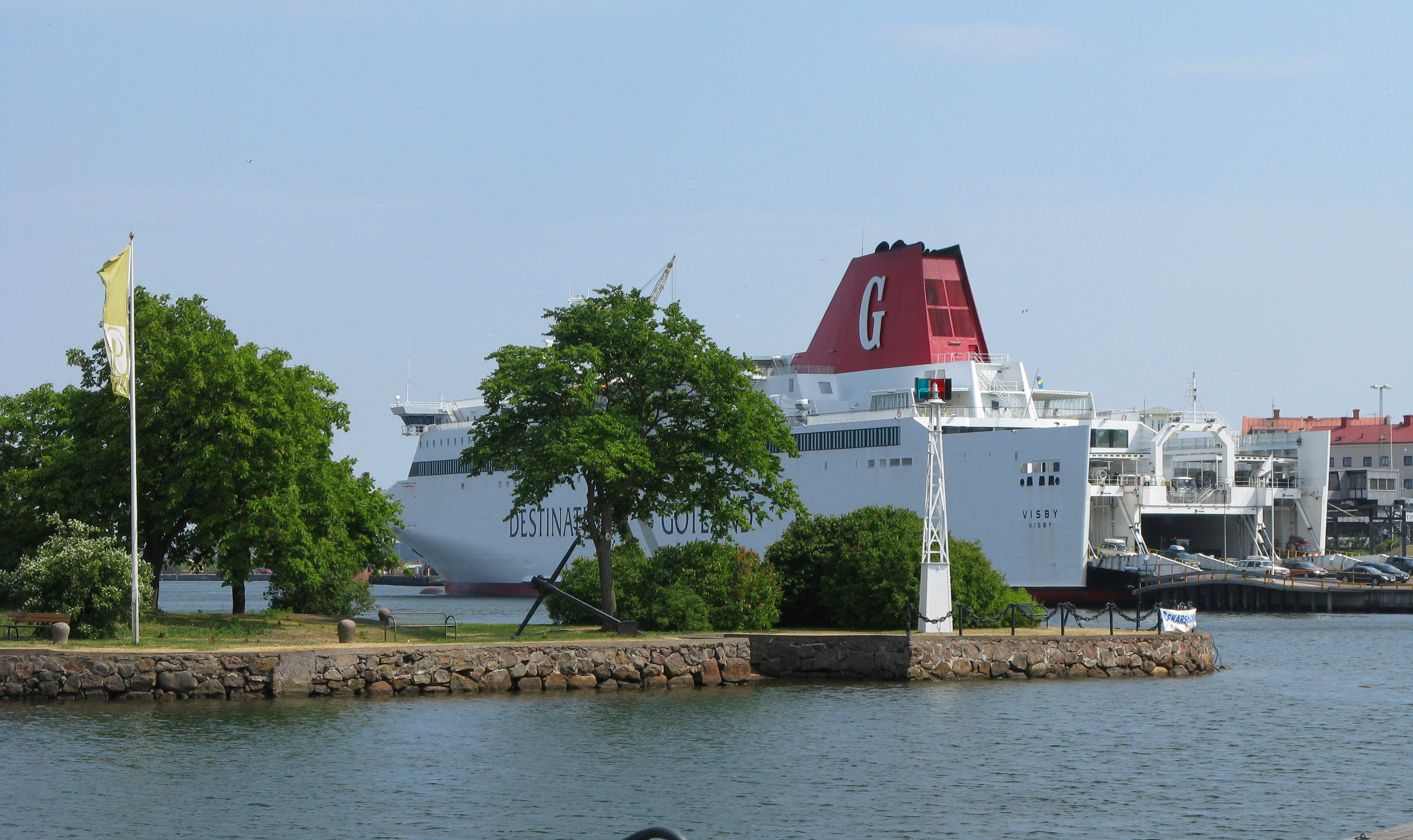 Vy mot Badholmen i Oskarshamn med färjan M/S Visby i bakgrunden.